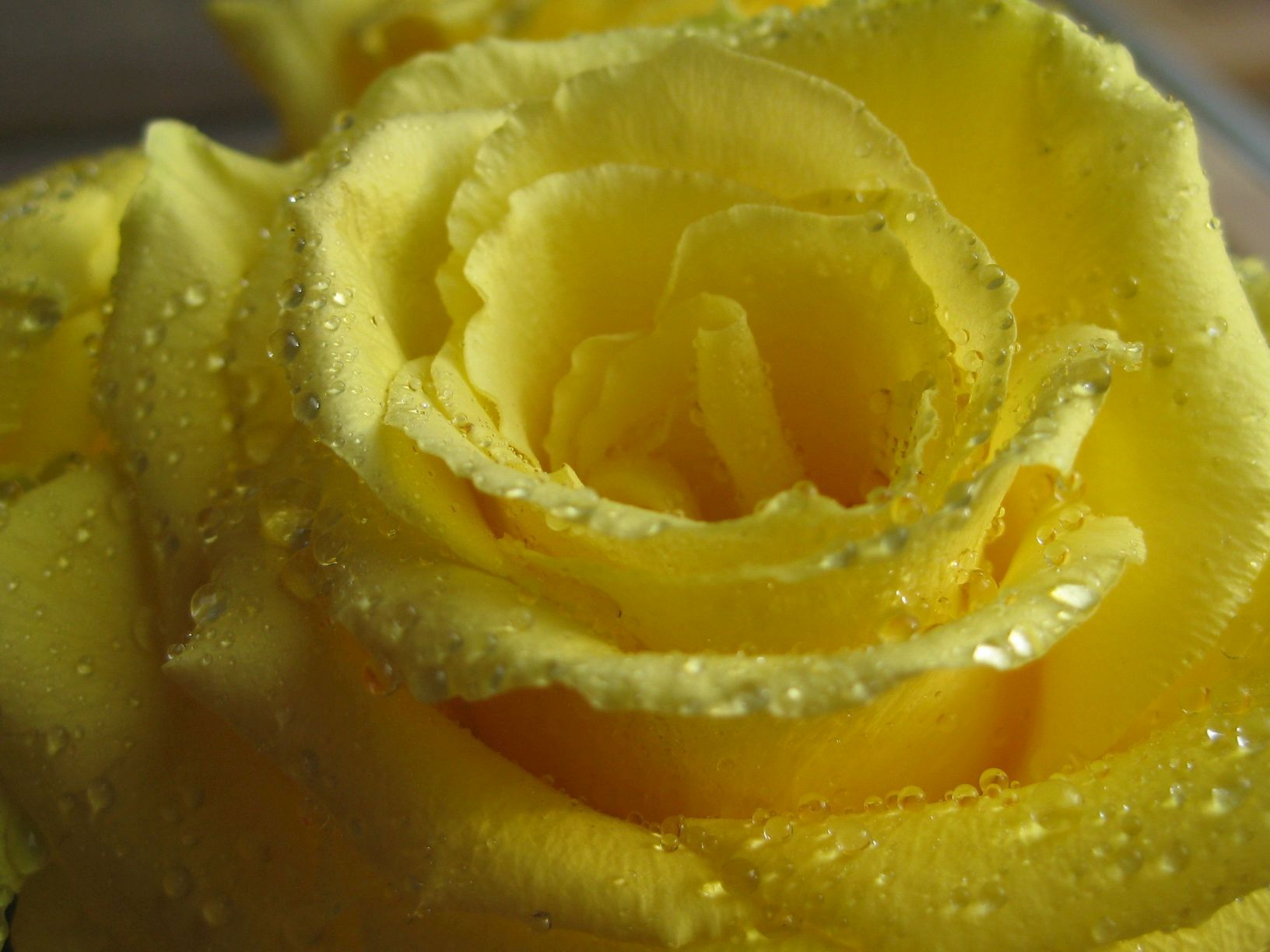 Zonta kollane roos